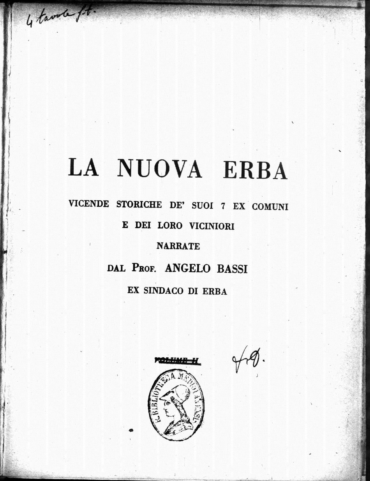 Frontespizio